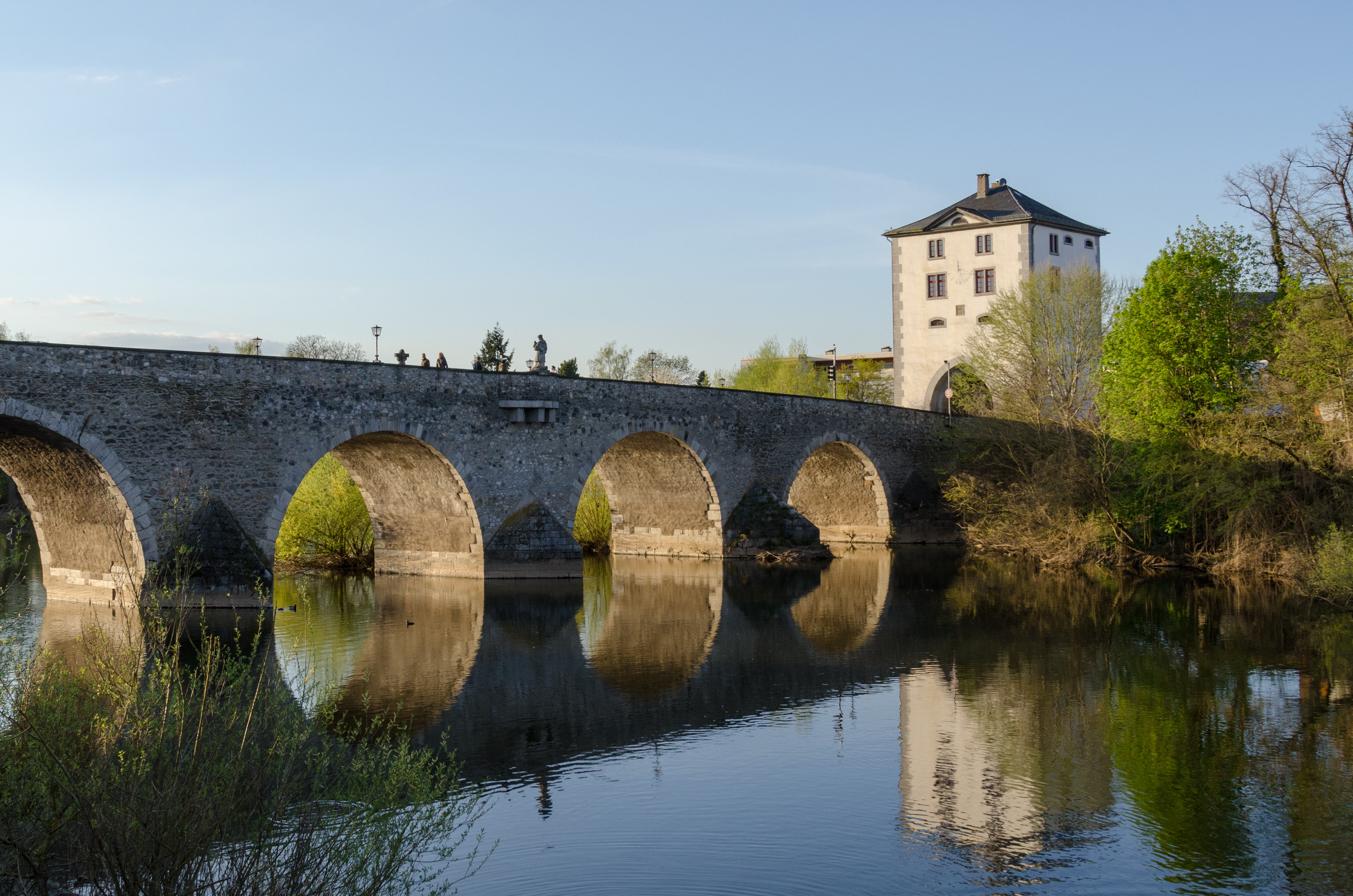 Limburg an der Lahn, Alte Lahnbrücke